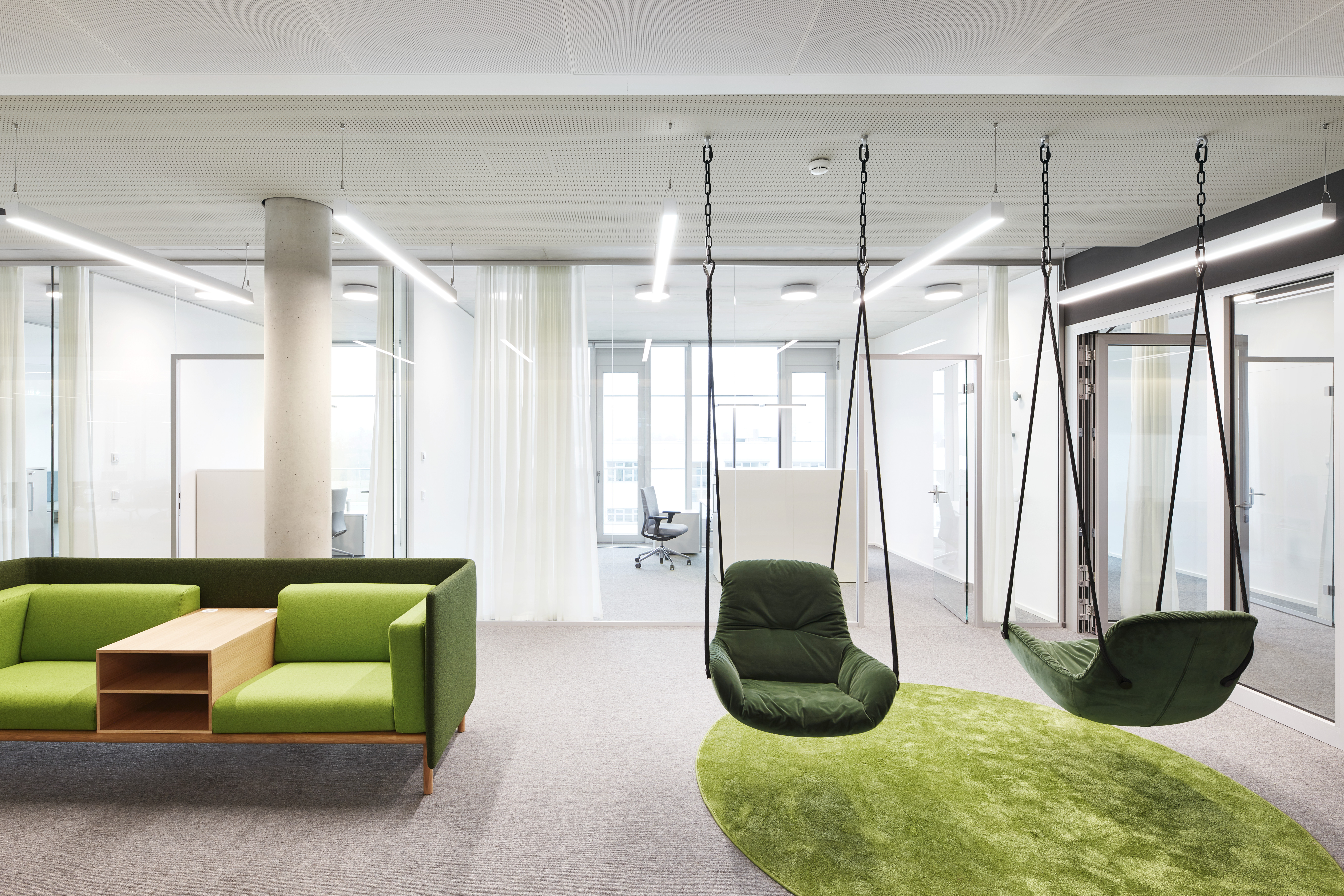 MEDICE Innenansicht